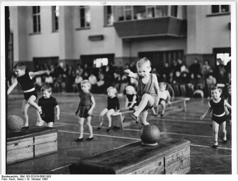 Leipzig, DHfK, Kinderturnen Zentralbild Koch-Stu 19.10.1965-Leipzig: 15 Jahre Deutsche Hochschule für Körperkultur in Leipzig. Auf einem wissenschaftlichen Seminar "Gestaltung der Körpererziehung im Vorschulalter", dass vom 18.-19.10.1965 stattfand, demonstrieren Kinder verschiedene Bewegungsformen. Die DHfK feiert am 22.10.1965 ihr 15jähriges Bestehen.